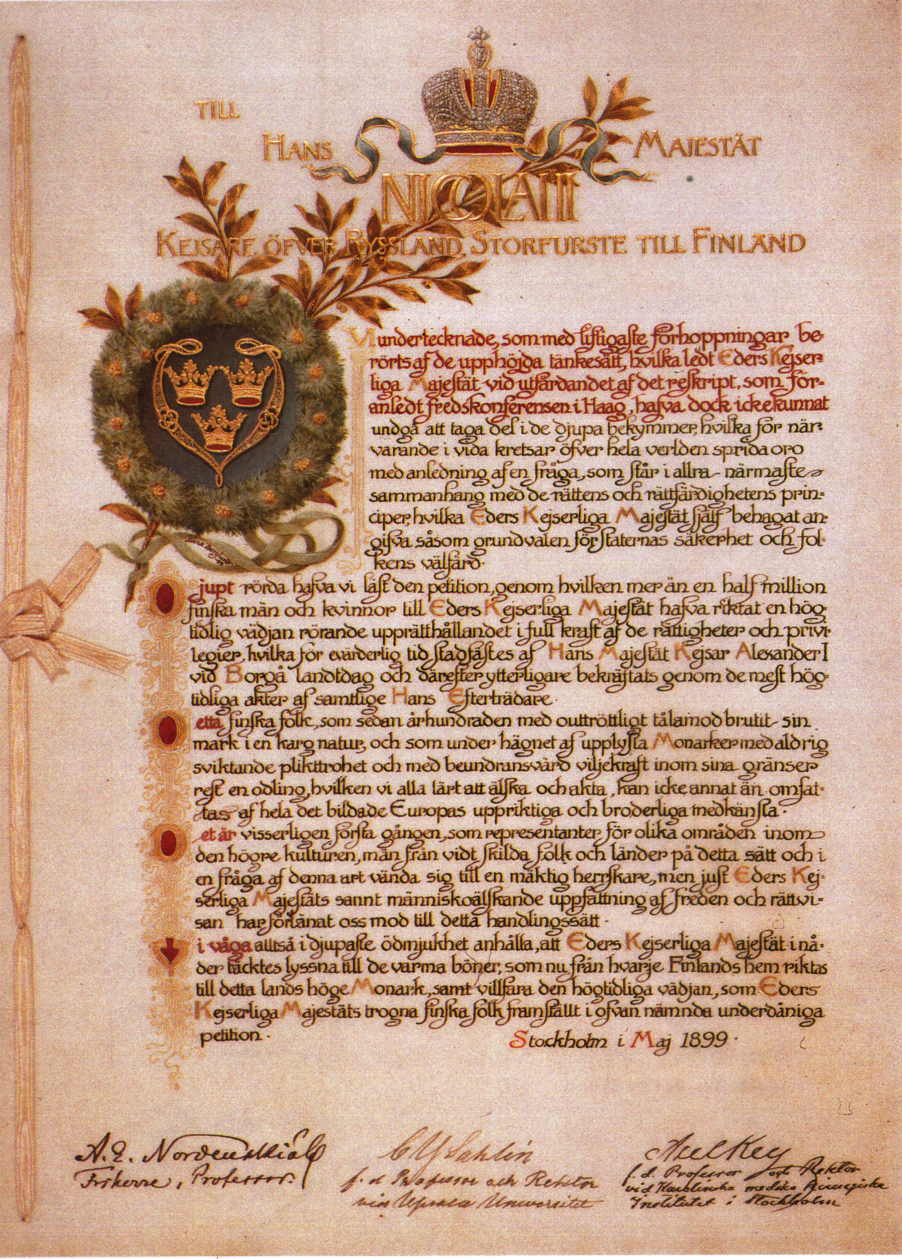 Helmikuun manifestin vastaisen kansainvälisen kulttuuriadressin ruotsinkielisen kappaleen kansilehti.